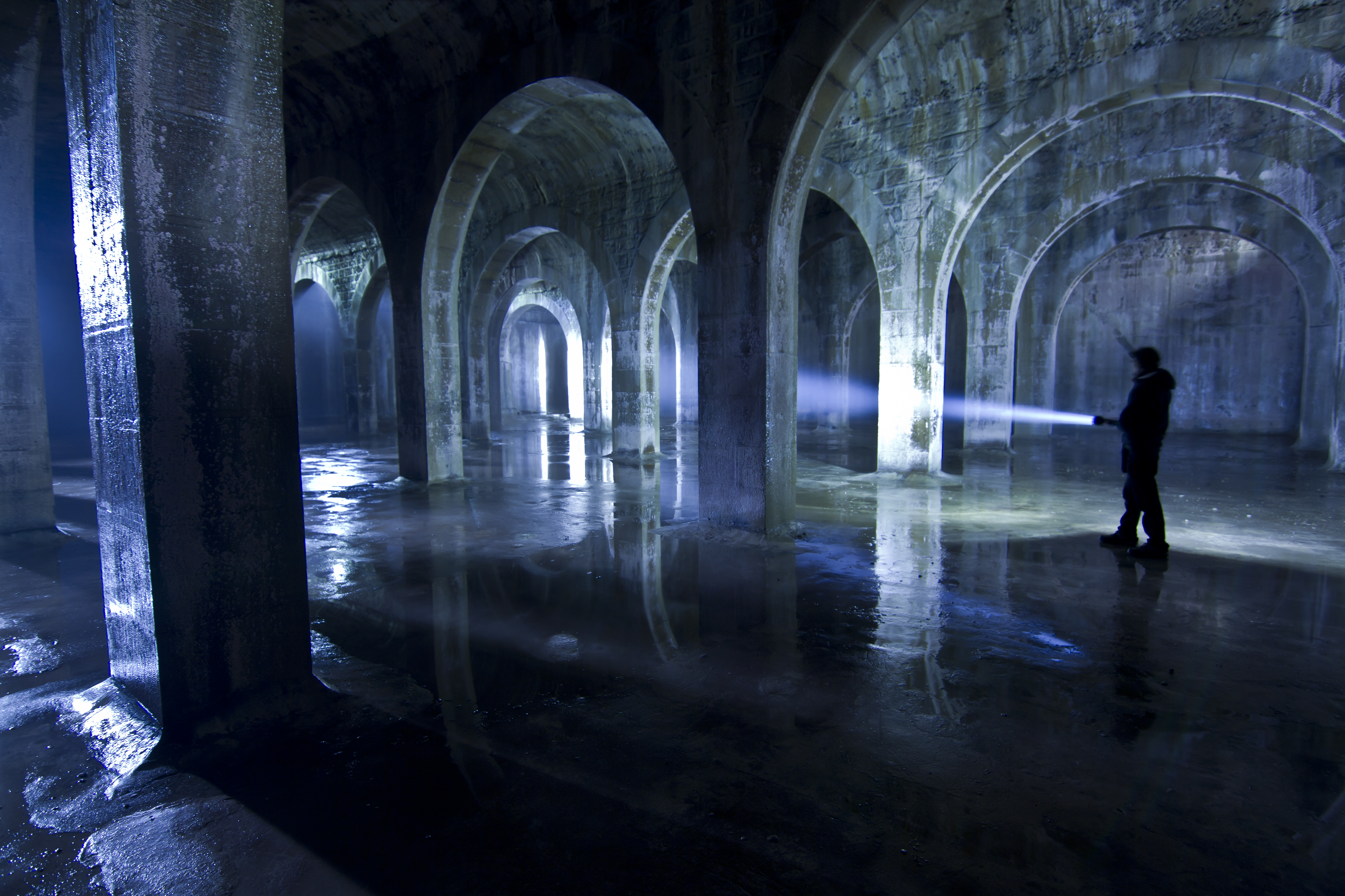 Buskando ur-biltegia. Donostiako Ulia auzoan. Egilea: Lumina Nocte